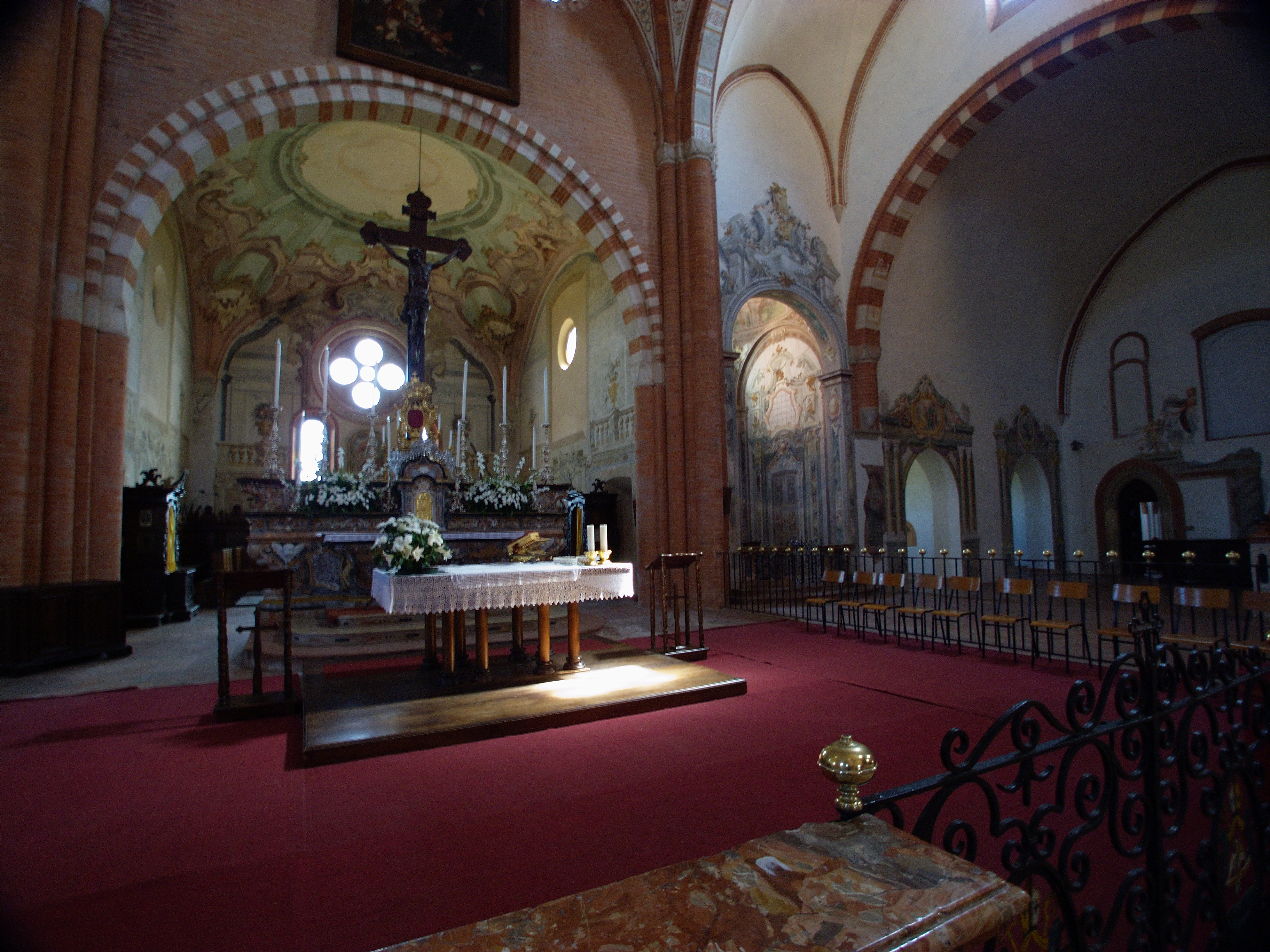 Abbazia di Chiaravalle della Colomba - Coro e transetto sud / Chiaravalle della Colomba Abbey - Choir e southern Transept